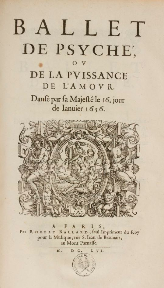 Title page of Benserade's Ballet de Psyché (1656)